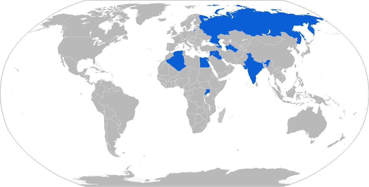 T-90 Operators